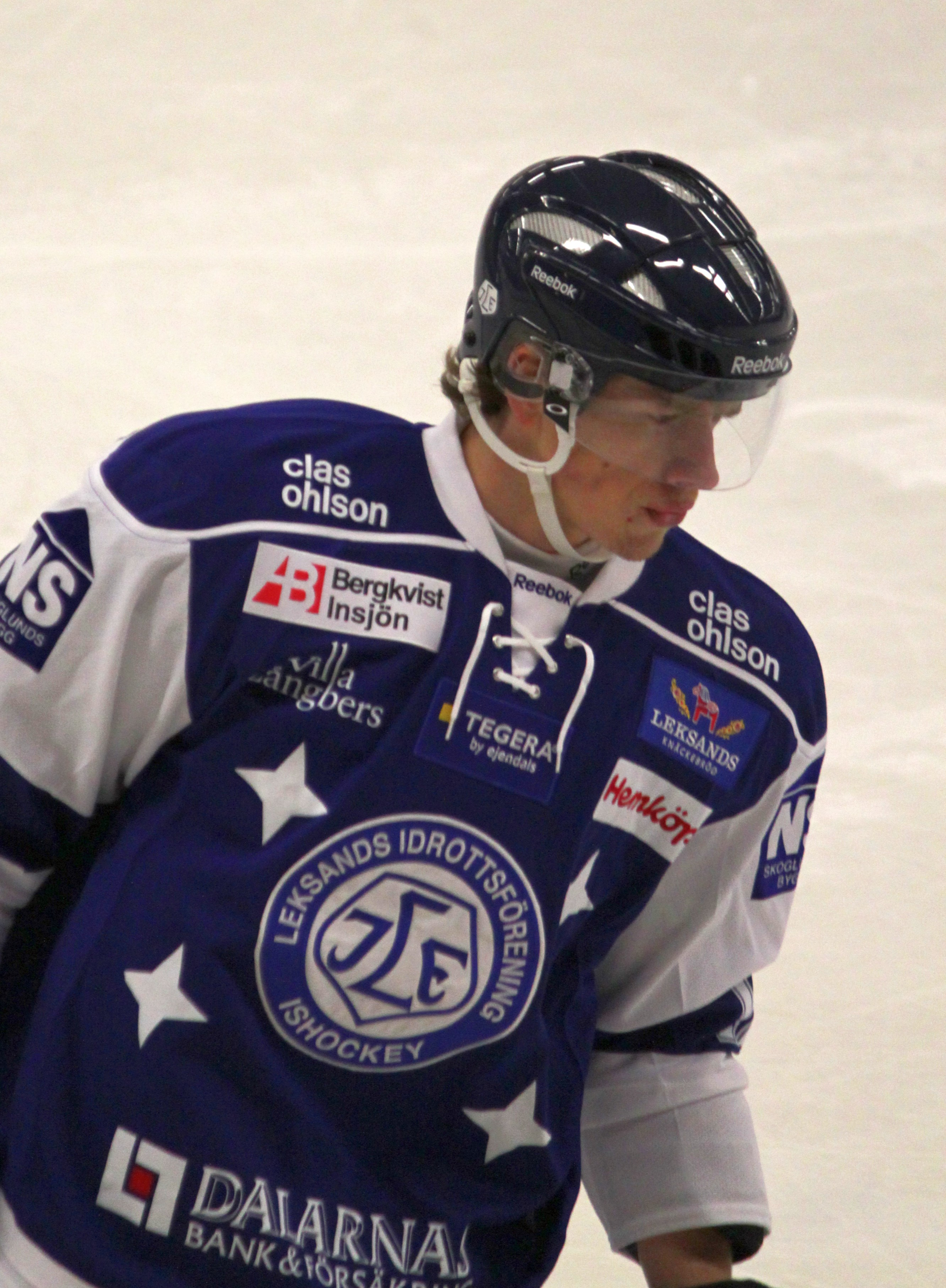 Michael Raffl. Träningsmatch mellan Leksands IF och Bofors IK, Bolidenhallen, Hedemora